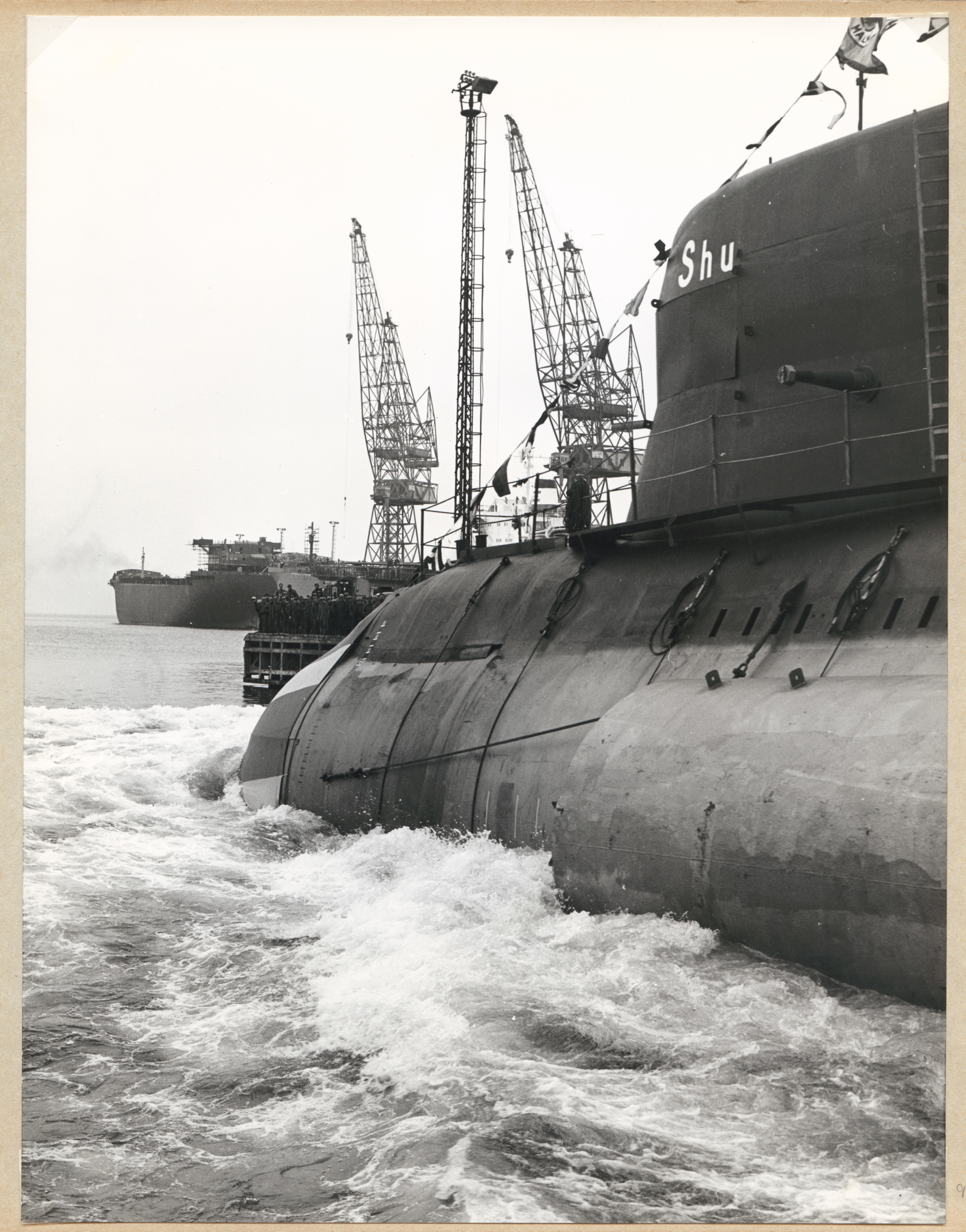 Den svenska ubåten HMS Sjöhunden (Shu) sjösätts.